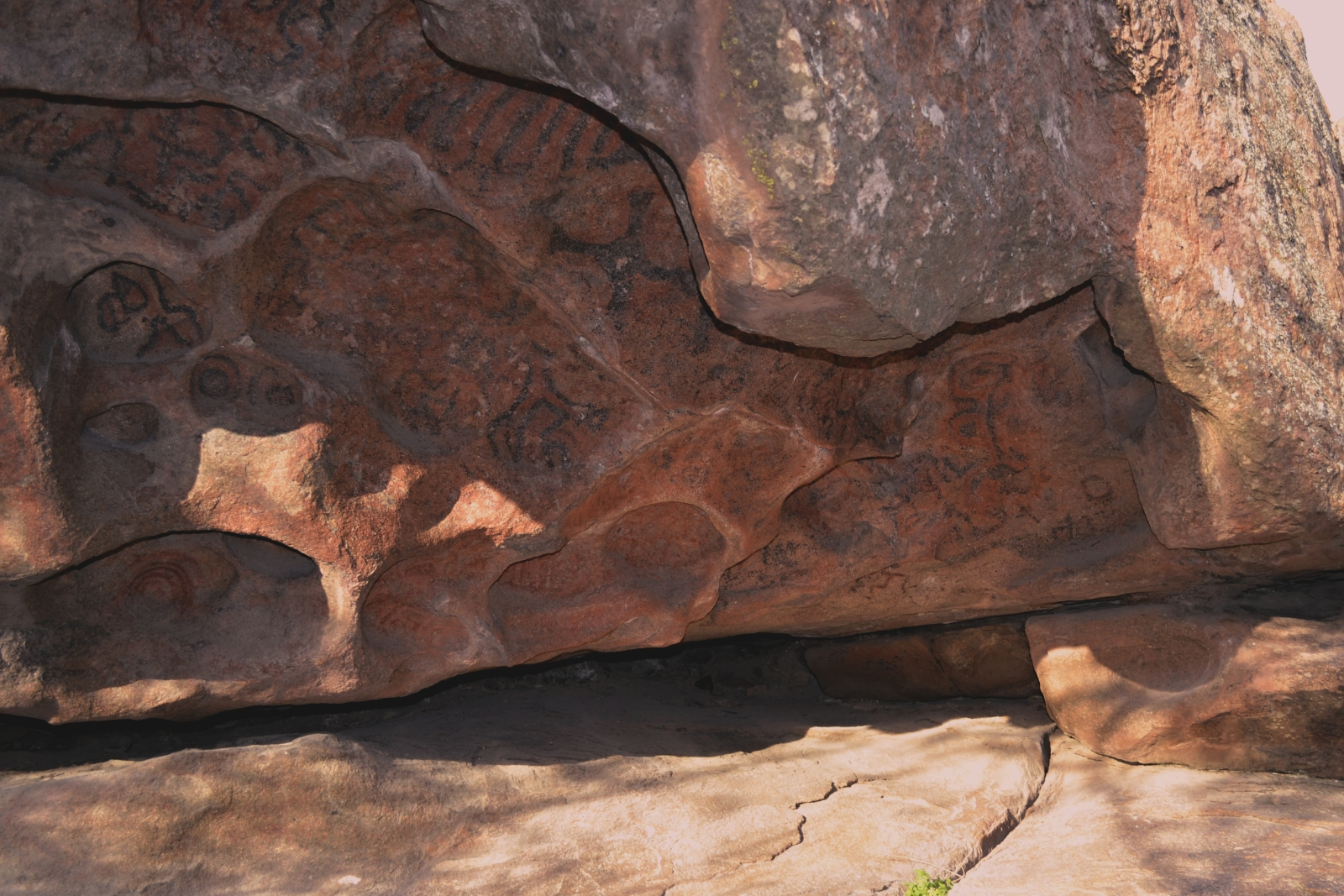 Pinturas rupestres en el Parque Nacional Lihué Calel.